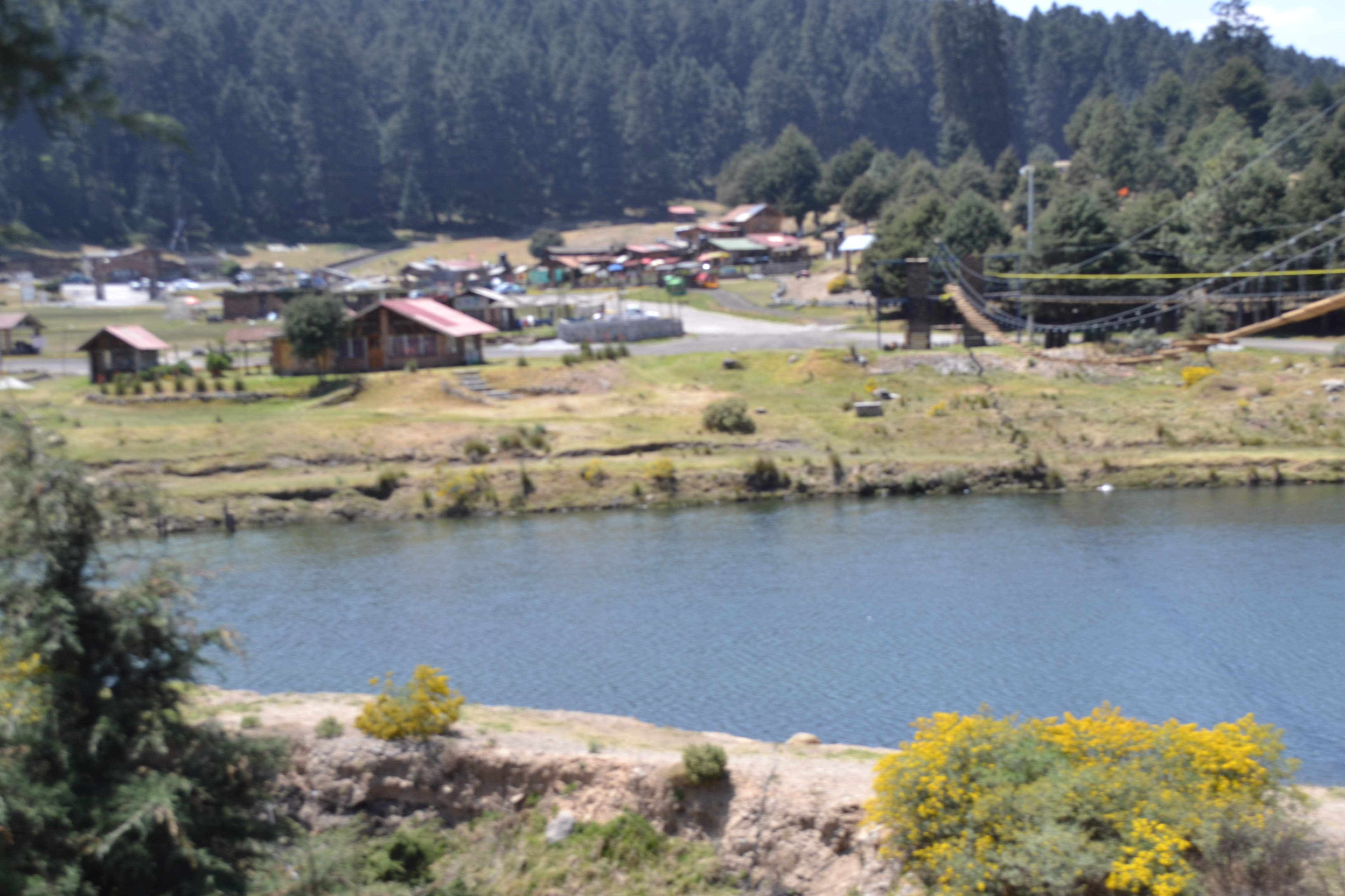 Así se aprecia el lago desde alto